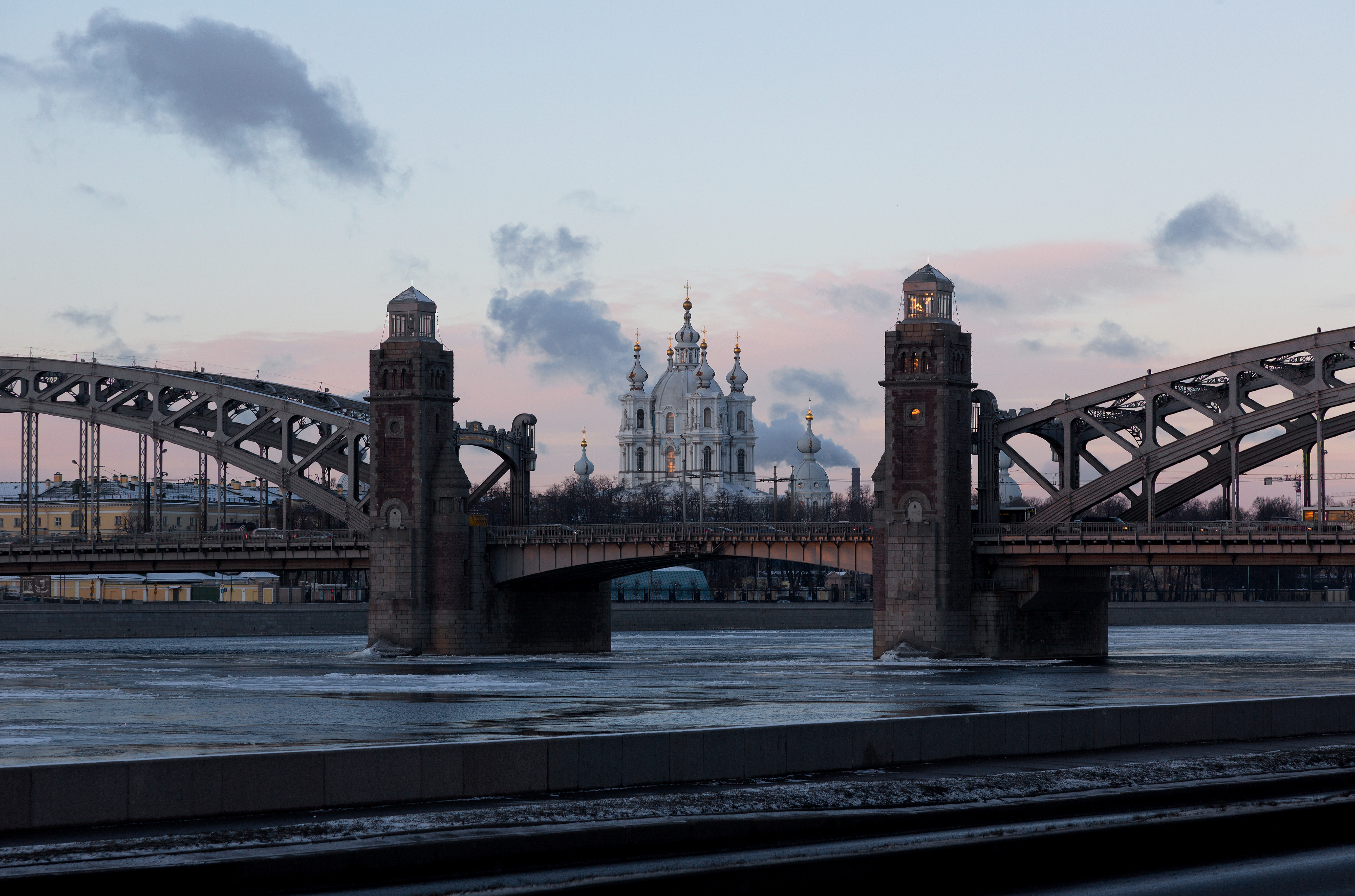 Мост Большеохтинский (мост Петра Великого): через р. Неву, по оси Тульской улицы к Красногвардейской площади, Красногвардейский район, Санкт-Петербург